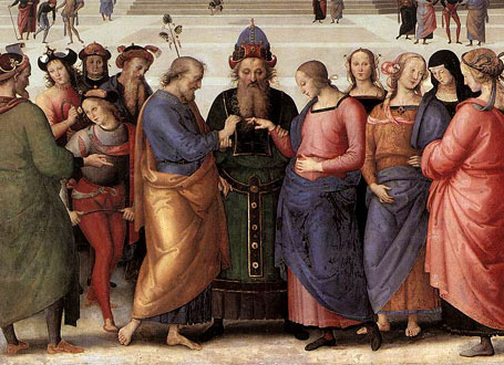 matrimonio en bizancio.